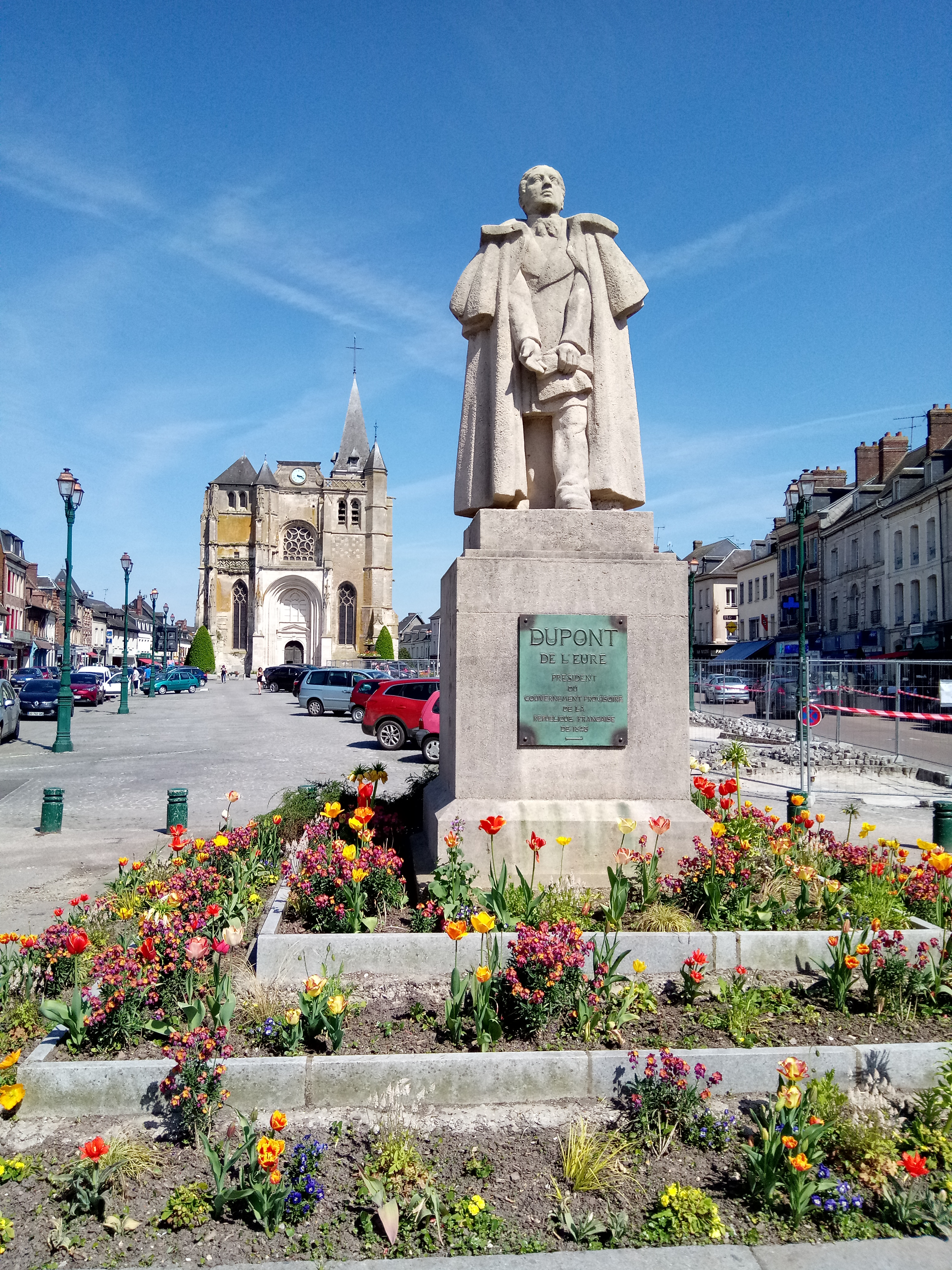 La statue de Jacques Dupont-de-l'Eure et, en arrière-plan, l'église Saint-Pierre-et-Saint-Paul